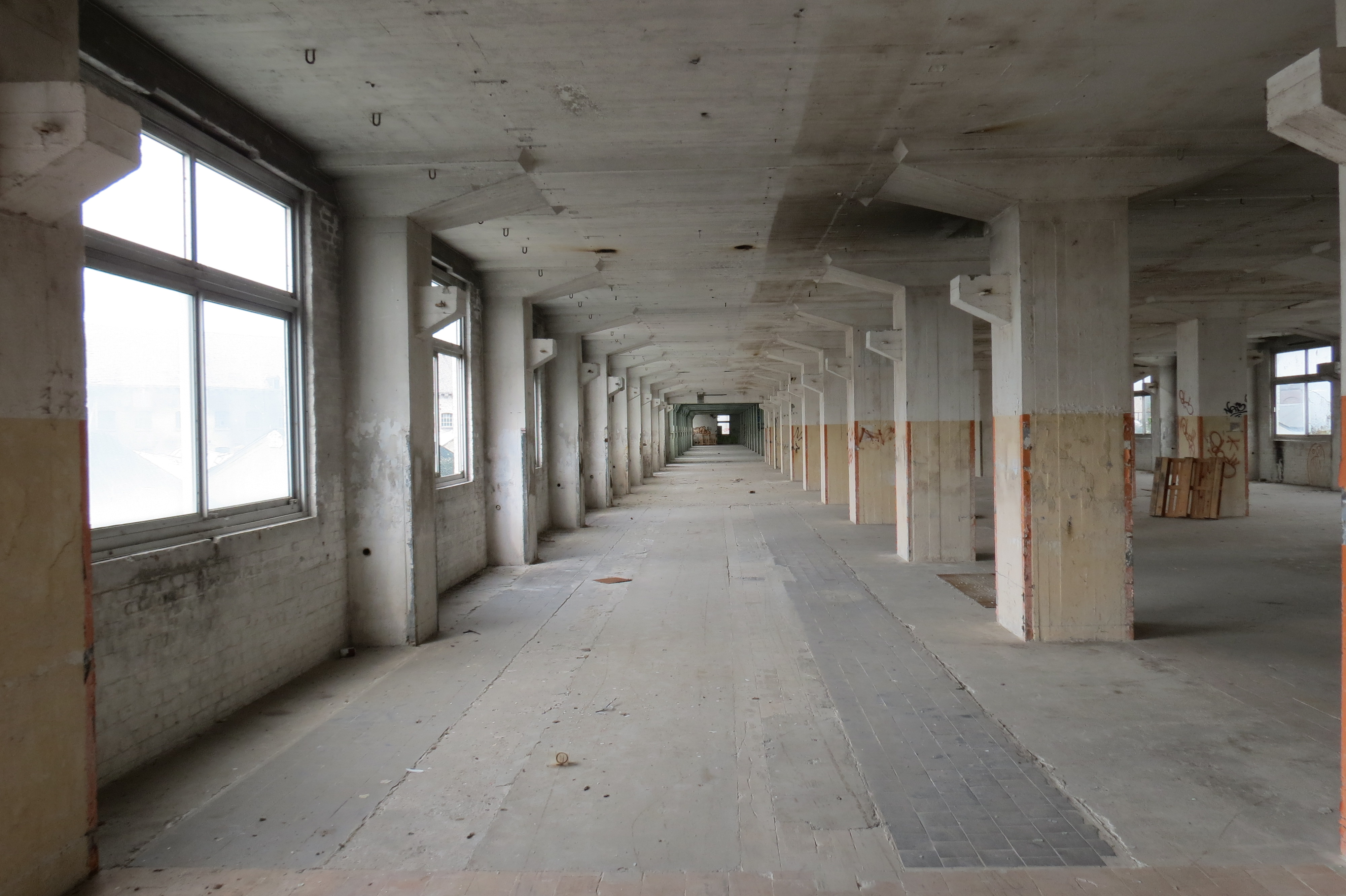 Zicht op de 2e etage van het Eifelgebouw waarbij de zicht richting zuid - noord is. De linkerzijde is de westgevel van het gebouw.